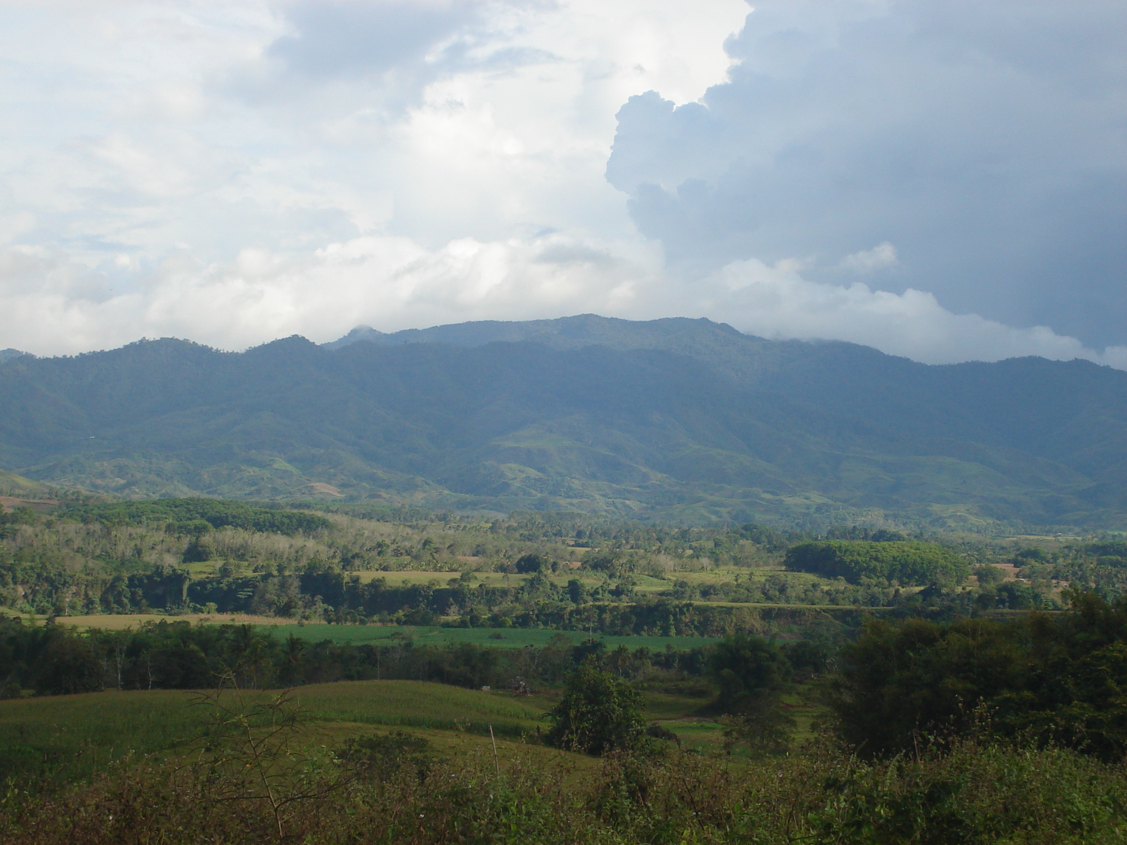 Mountain range in Cabanglasan, Bukidnon